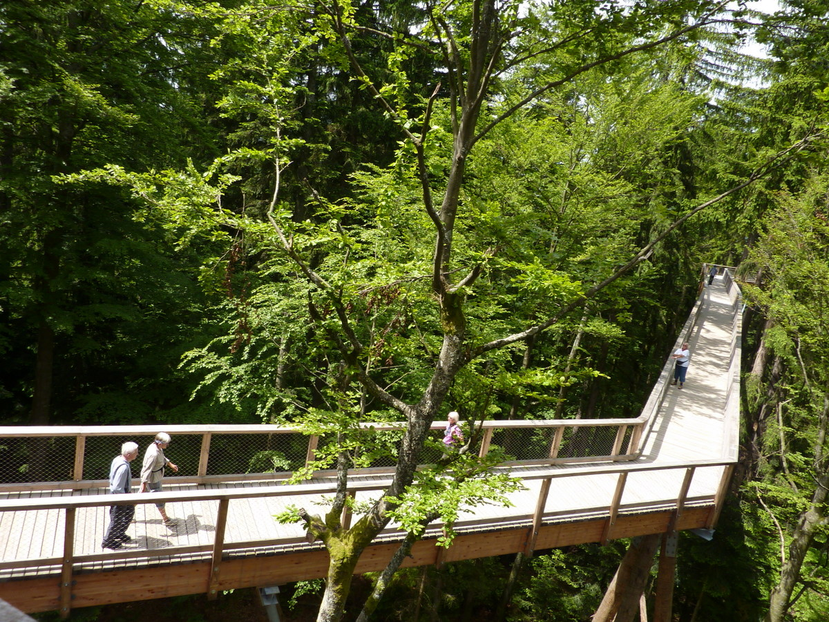 Baumwipfelpfad Neuschönau, Nationalpark Bayerischer Wald, Weg zum Baumturm